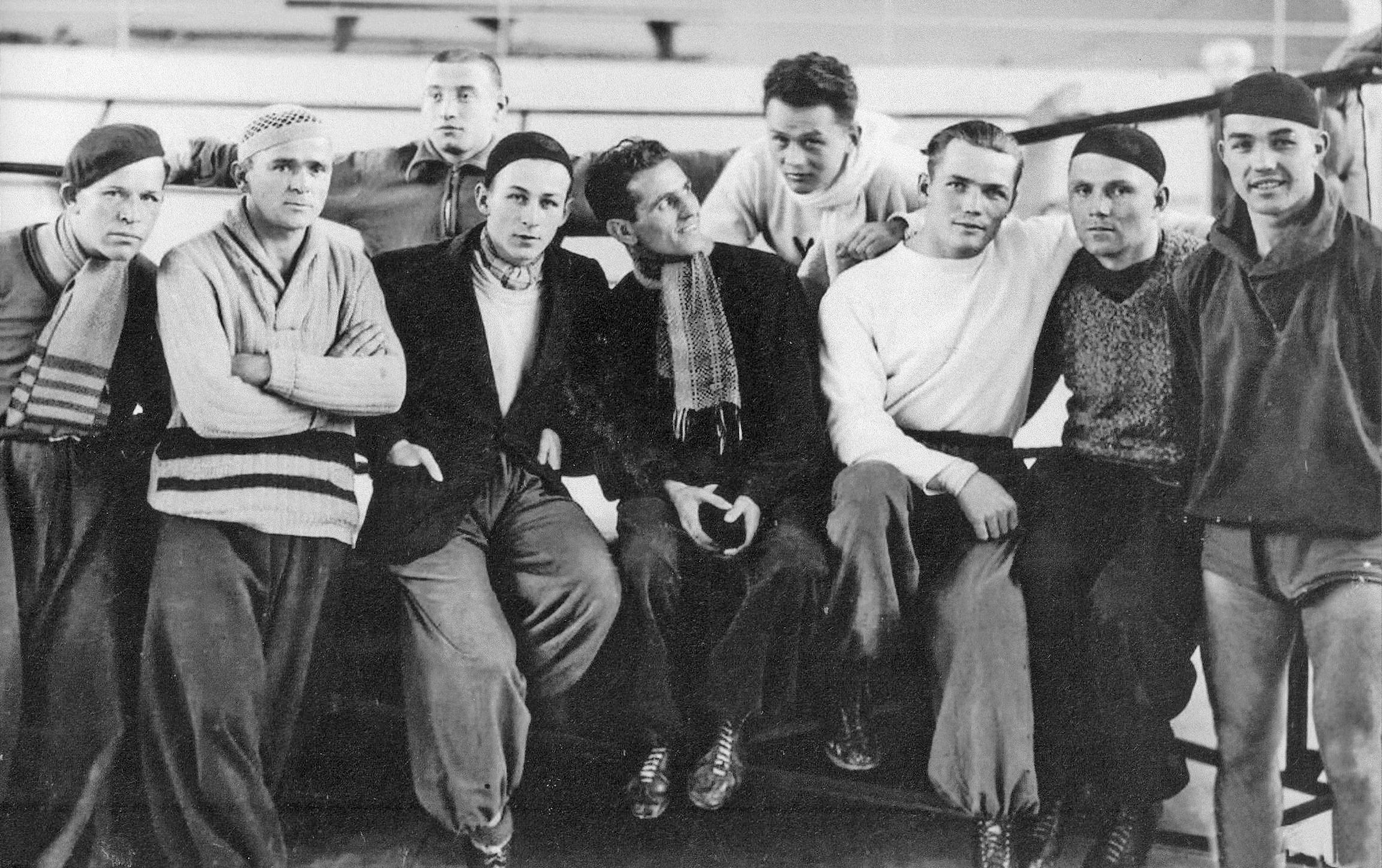 Polska reprezentacja bokserska na Pięściarski Puchar Europy Środkowej w Essen. Stoją od lewej: Czesław Banasiak, trener Feliks Stamm, Czesław Cyraniak, Mieczysław Forlański, Walery Karpiński, Ryszard Krenz i Henryk Chmielewski. W górny rzędzie od lewej: Szapsel Rotholc i Oktawian Misiurewicz. Listopad 1934